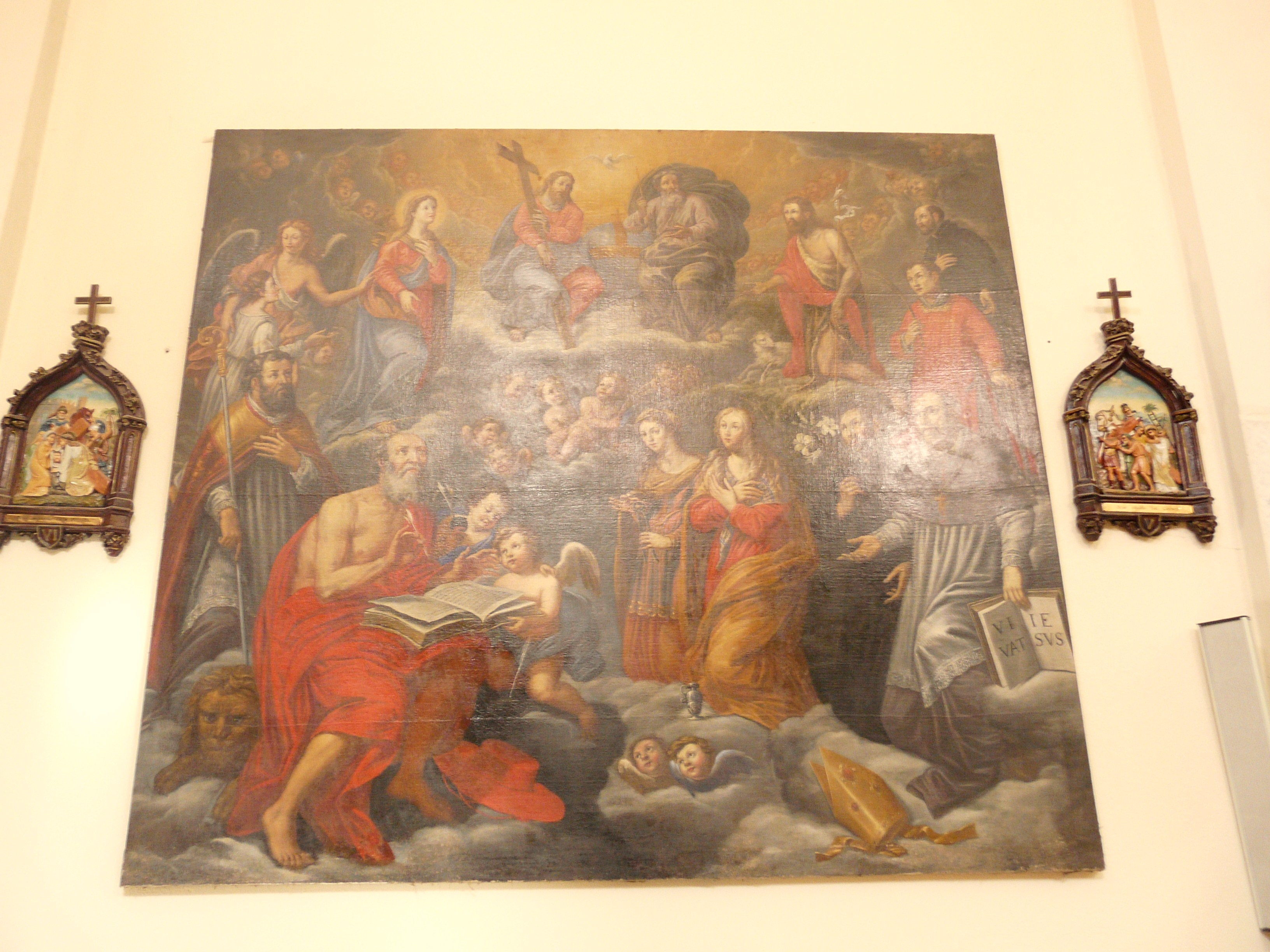 Chiesa-Santuario di San Remigio, Fosdinovo, Toscana, Italia